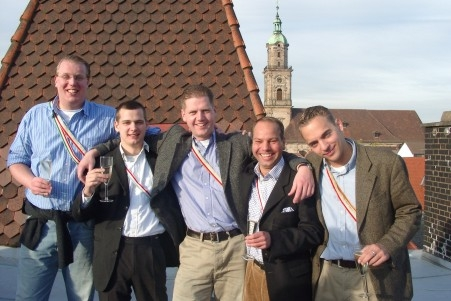 Mitglieder des Corps Masovia Potsdam (von links: Jöcks, F Hivy, Lerch, Grass, Grempe)